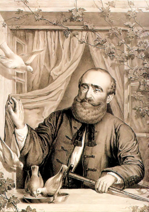 Széchenyi István Döblingben (M. Bäcker litográfiája Löschinger Zsigmond rajza alapján)